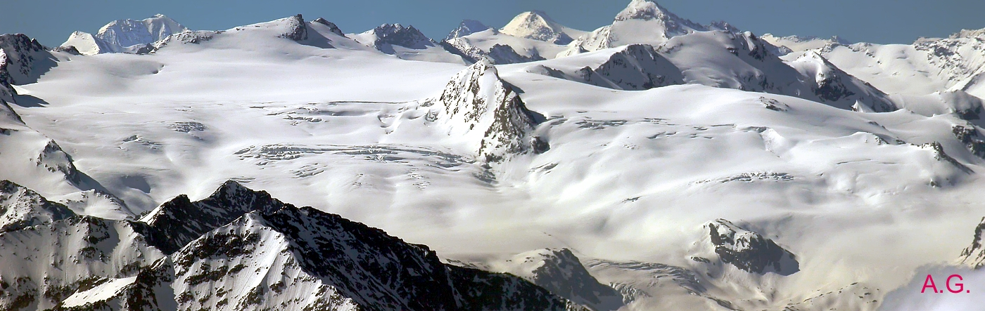 Il ghiacciaio del Rutor - Alpi Graie - Italy